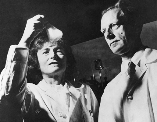 Gerty Theresa Cori in laboratorio